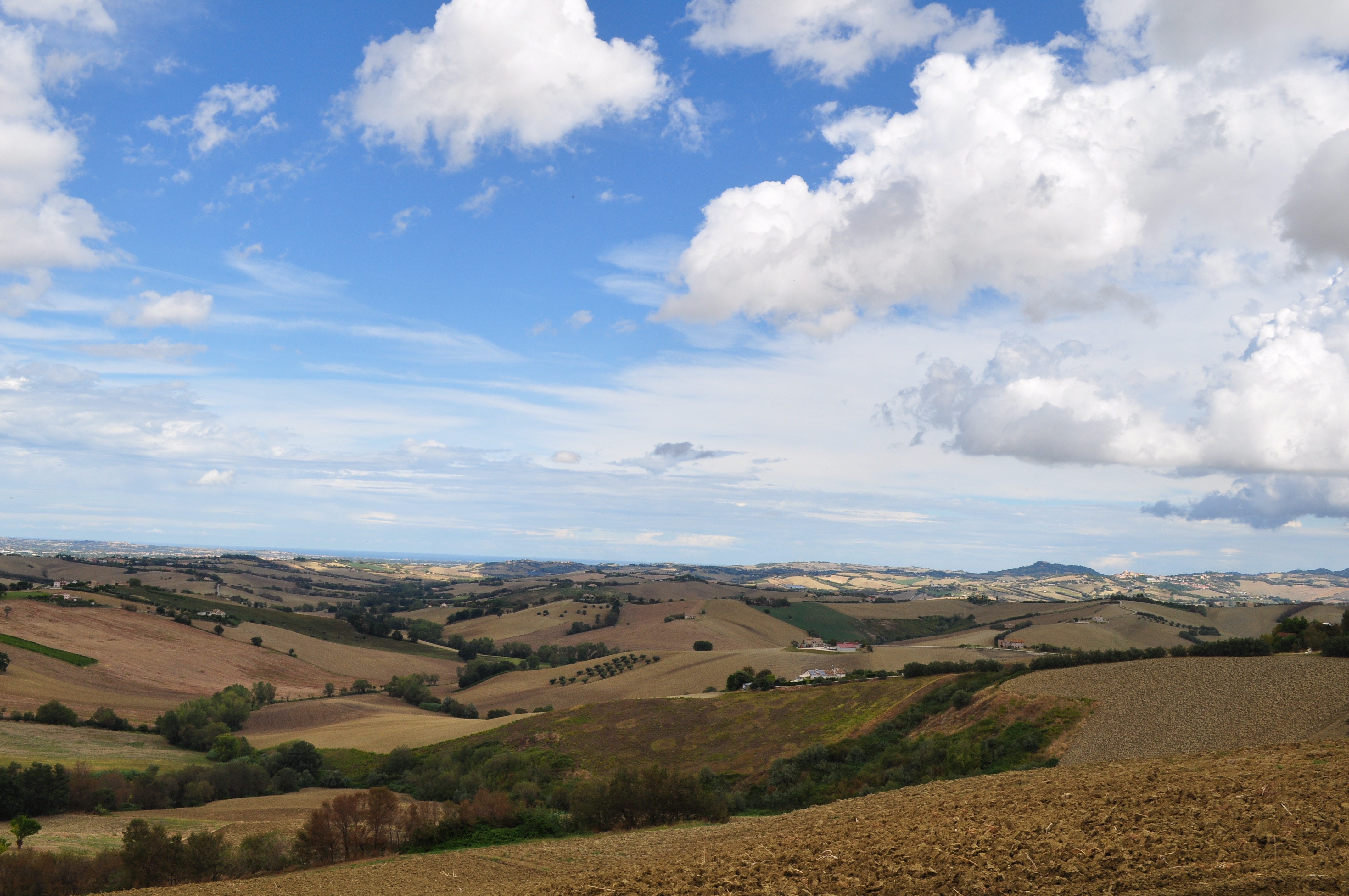 Paesaggio naturale di Santa Maria Nuova